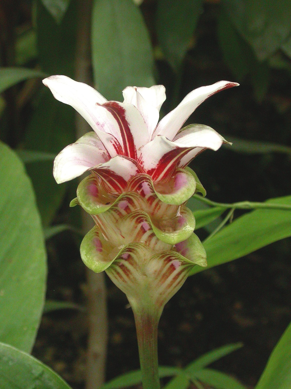 Curcuma rhabdota, Teplice botanical garden, Czech republic